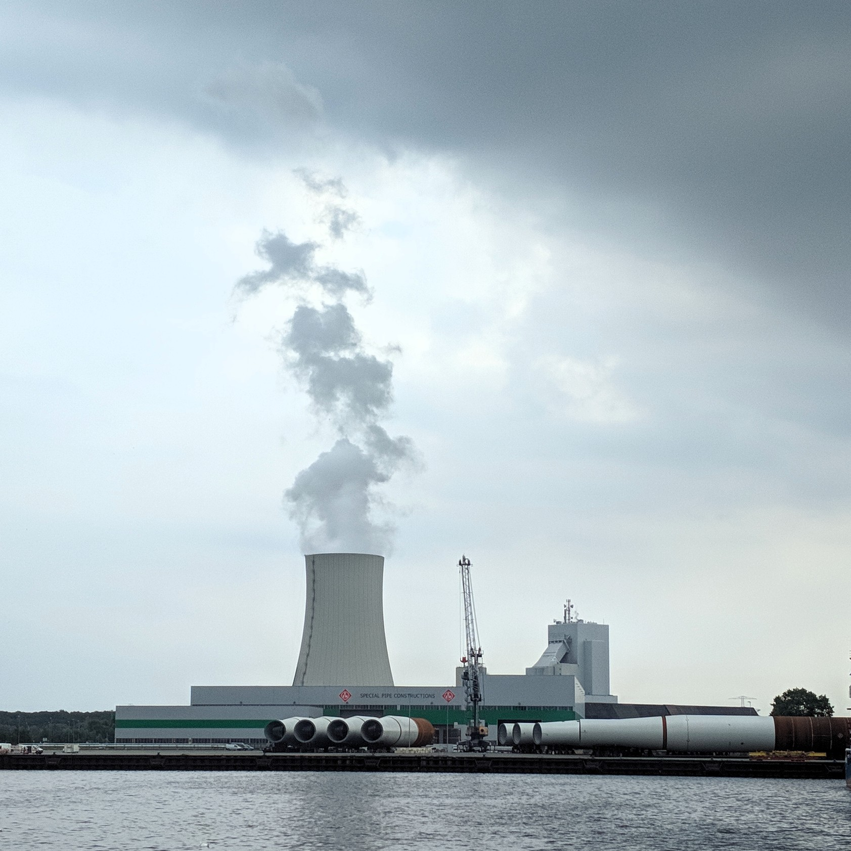 Erndtebrücker Eisenwerk, EEW Special Pipe Constructions im Überseehafen Rostock